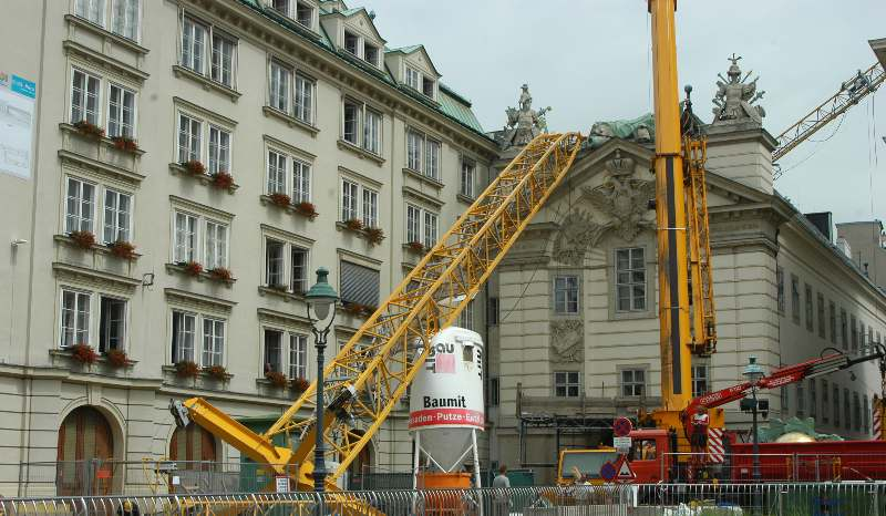 Zentralfeuerwache Wien (ehemaliges "Bürgerliches Zeughaus") nach der Katastrophe mit einem Turmdrehkran (1 Todesopfer) am 21. Juni 2007